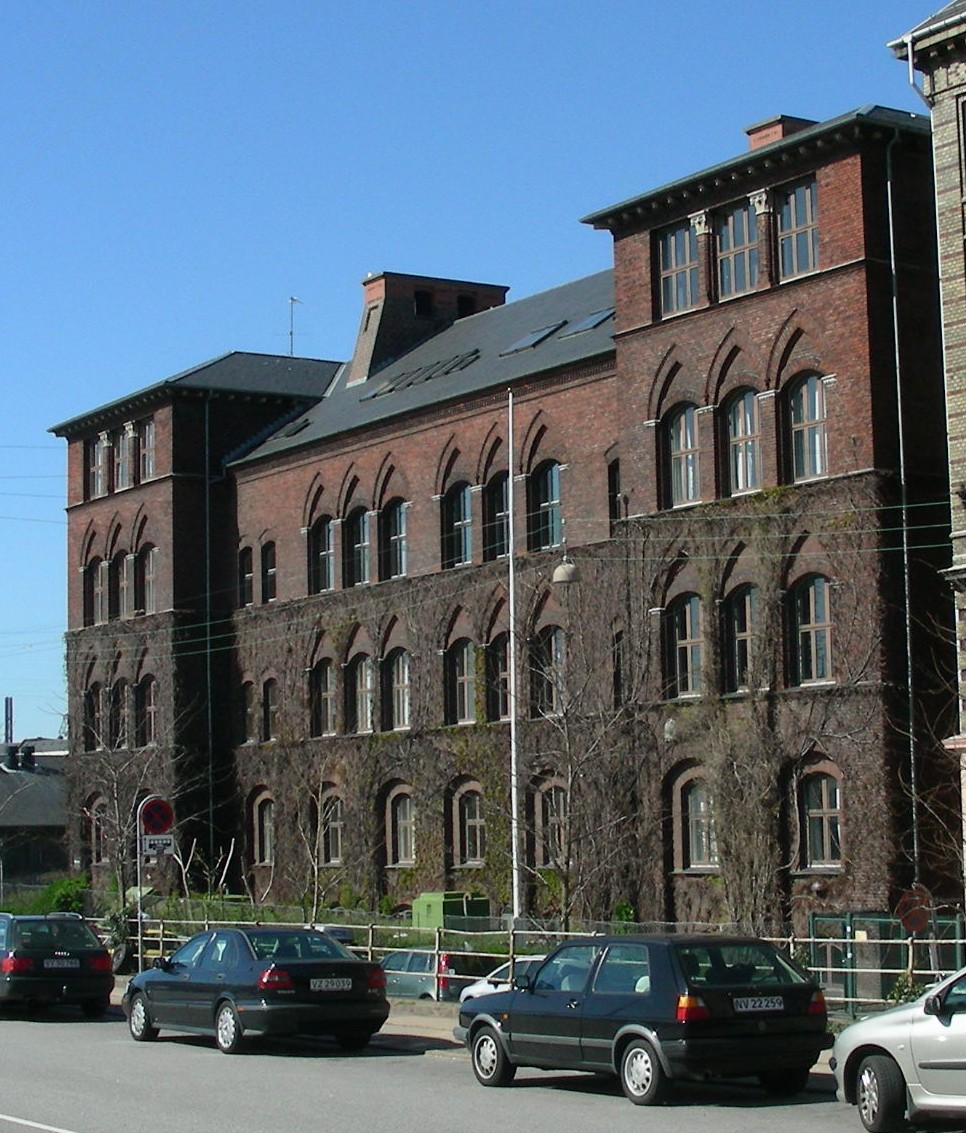 Rysensteen Gymnasium, Copenhagen, Denmark